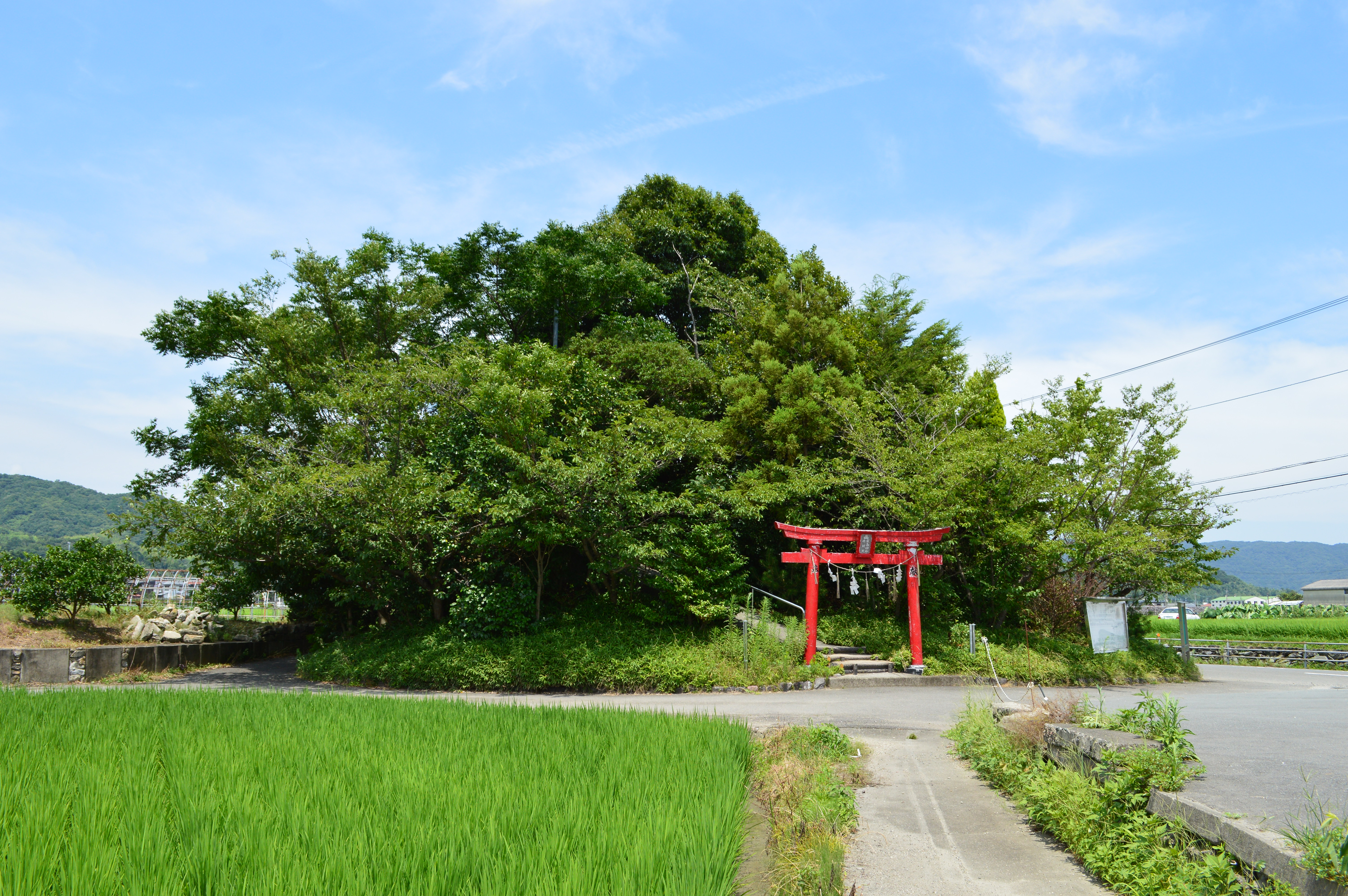 弁天山 (徳島市) 全景